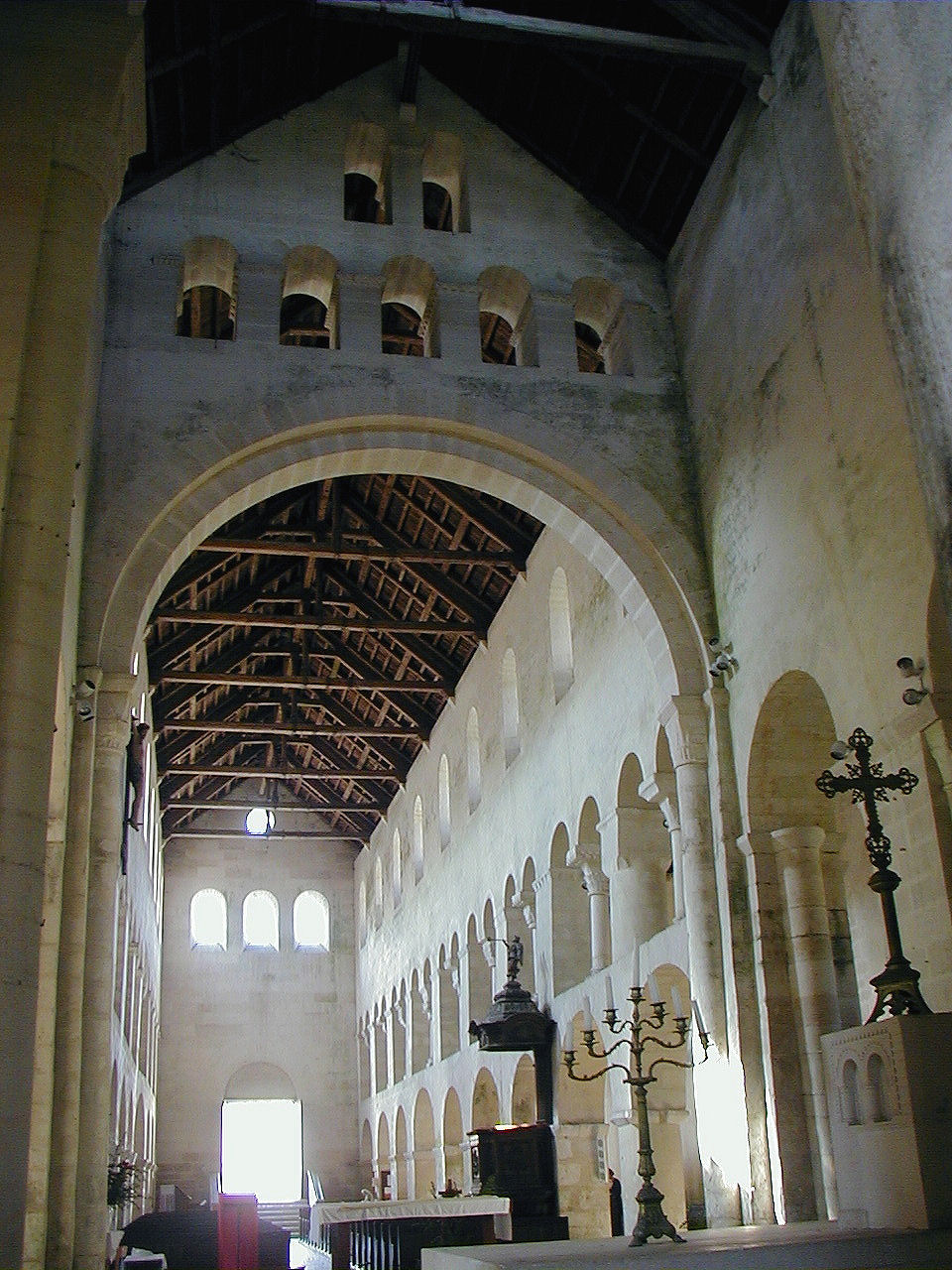 Vignory - Eglise Saint-Etienne - Nef vue du choeur